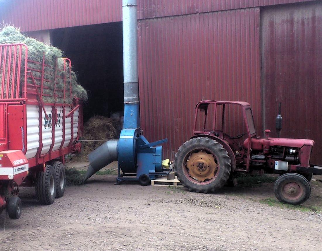 Vy från sidan av en höejektor, där den drivs av en Volvo BM-traktor